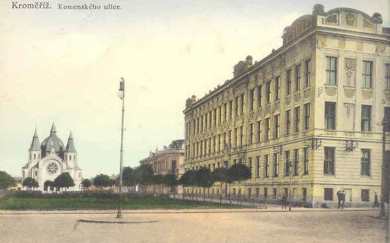 Synagoga v Kroměříži